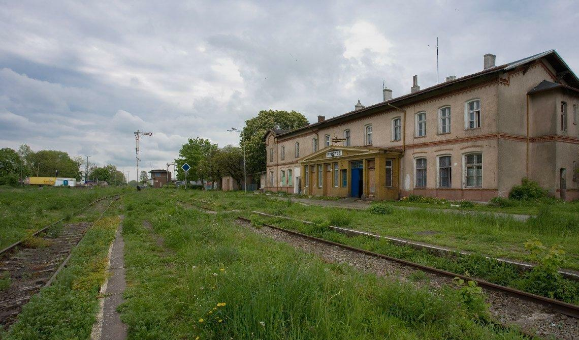 Teren stacji w Pyrzycach z budynkiem dworca. Budynek ma otynkowaną elewację, która pierwotnie była ceglana. Drewniany przedsionek jest dobudowany wtórnie. Tak wyglądał